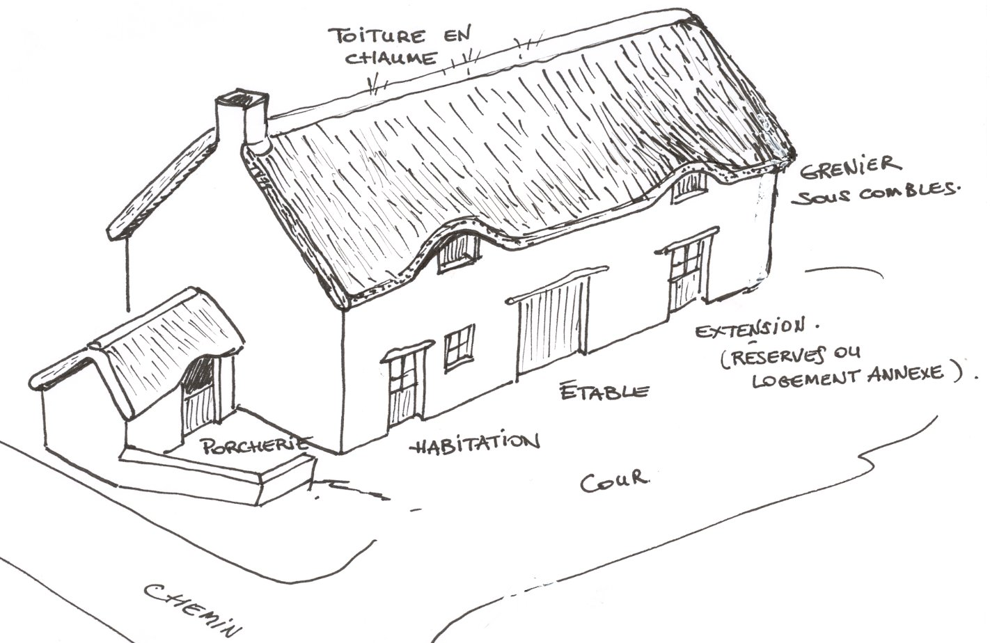 habitat traditionnel rural Parc de Brière